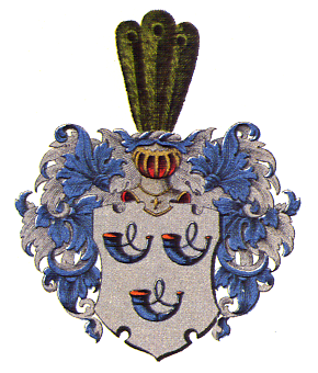 Vaakuna